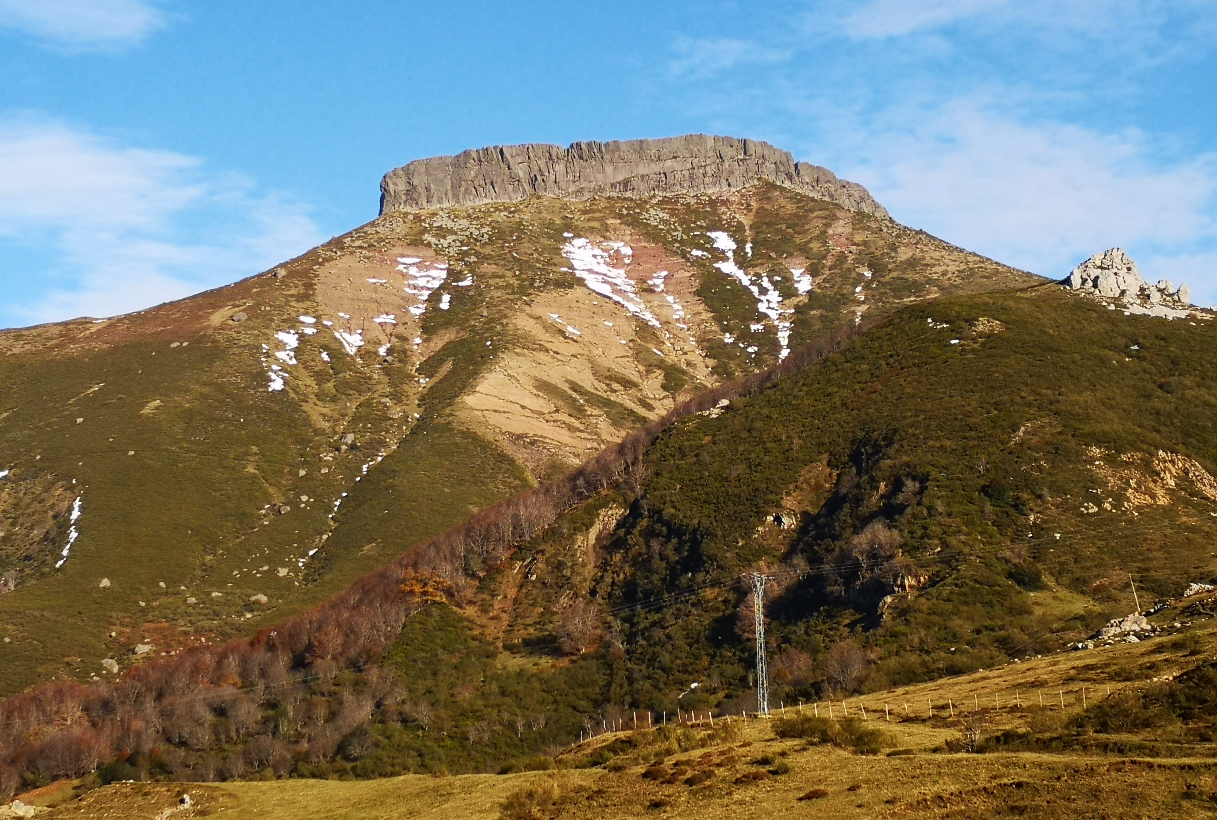 Vista de Peña Labra, en la Montaña Palentina (España)